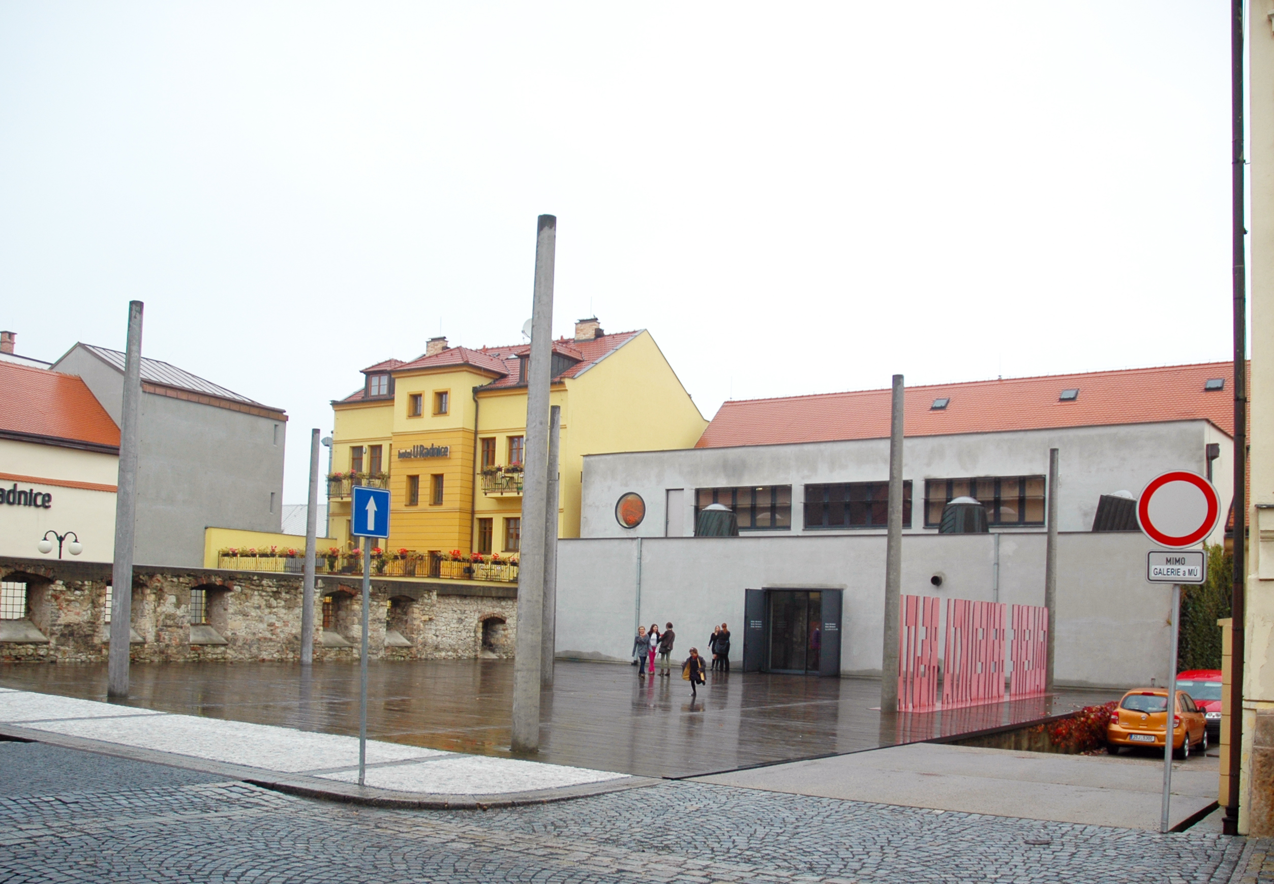 Galerie Benedikta Rejta v Lounech